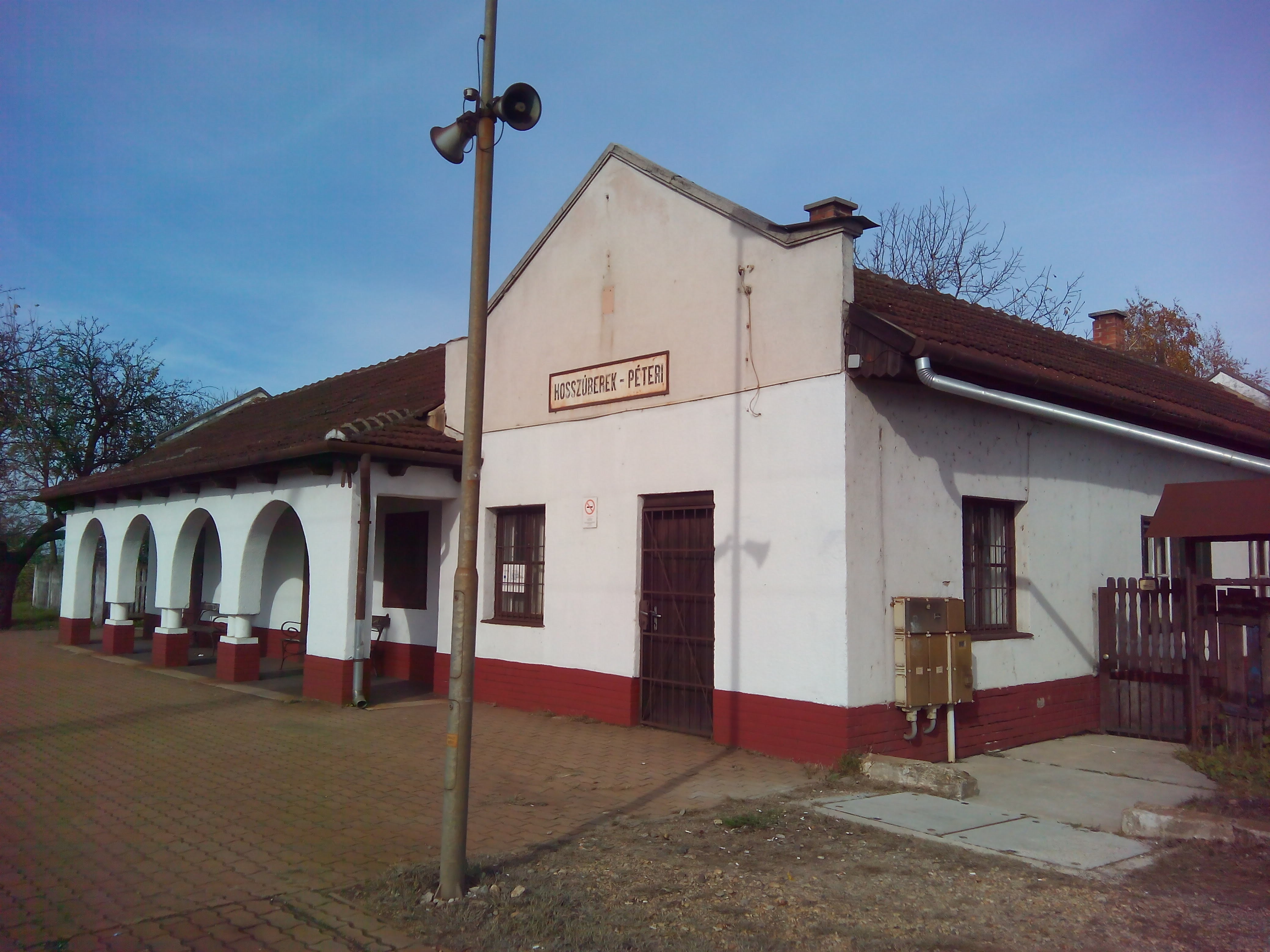 Hosszúberek-Péteri megállóhely